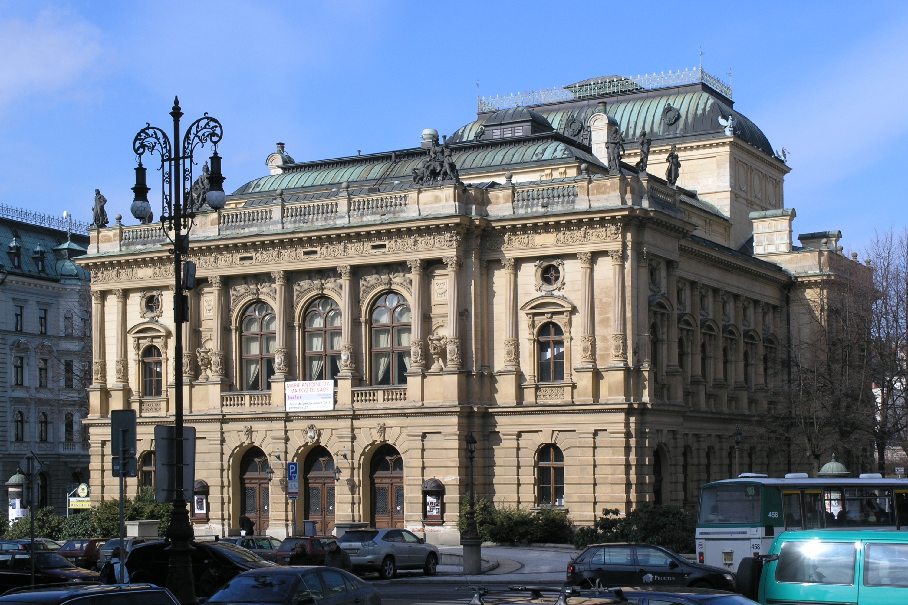 Liberec - Šaldovo divadlo